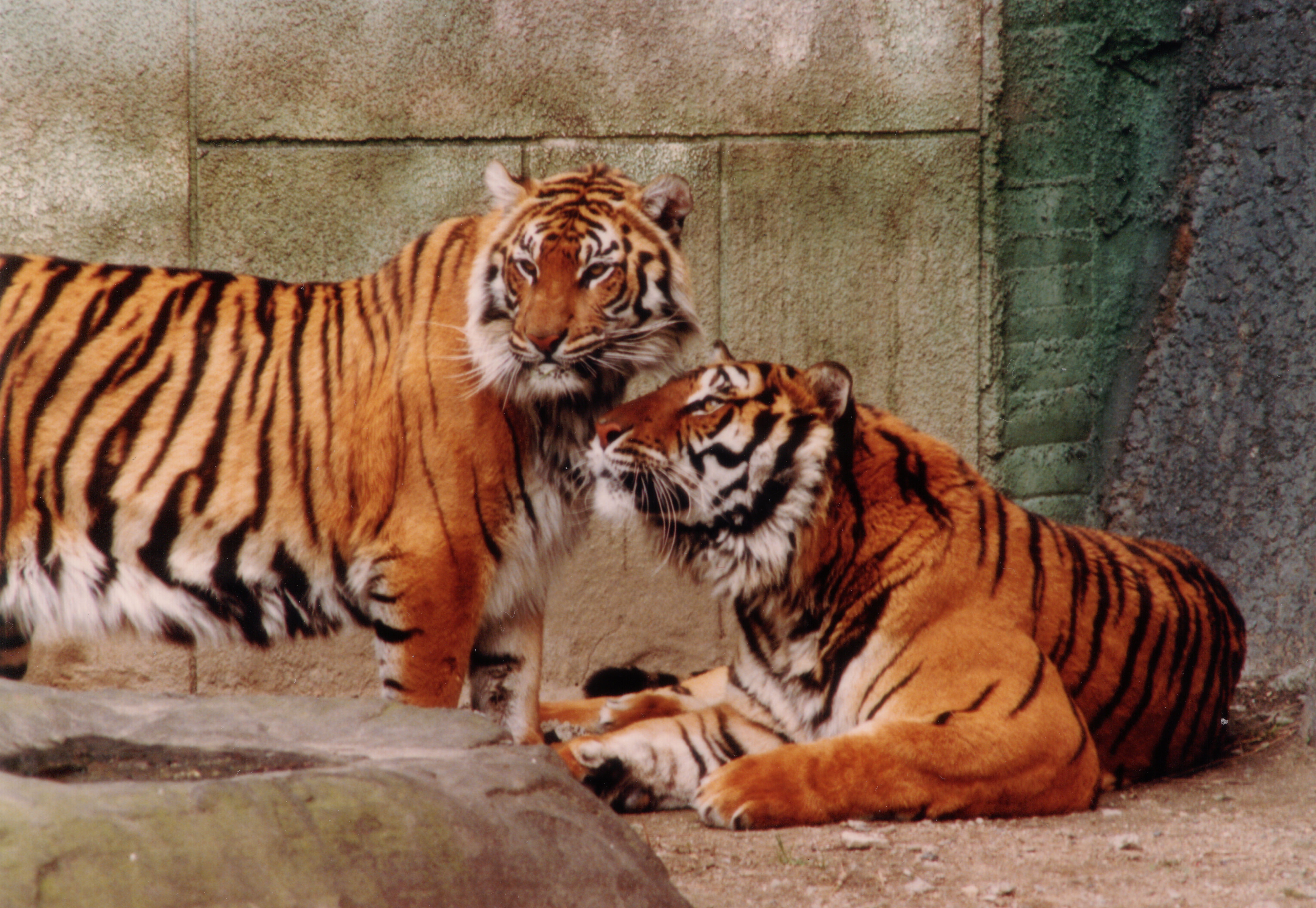 大阪天王寺動物園にて撮影